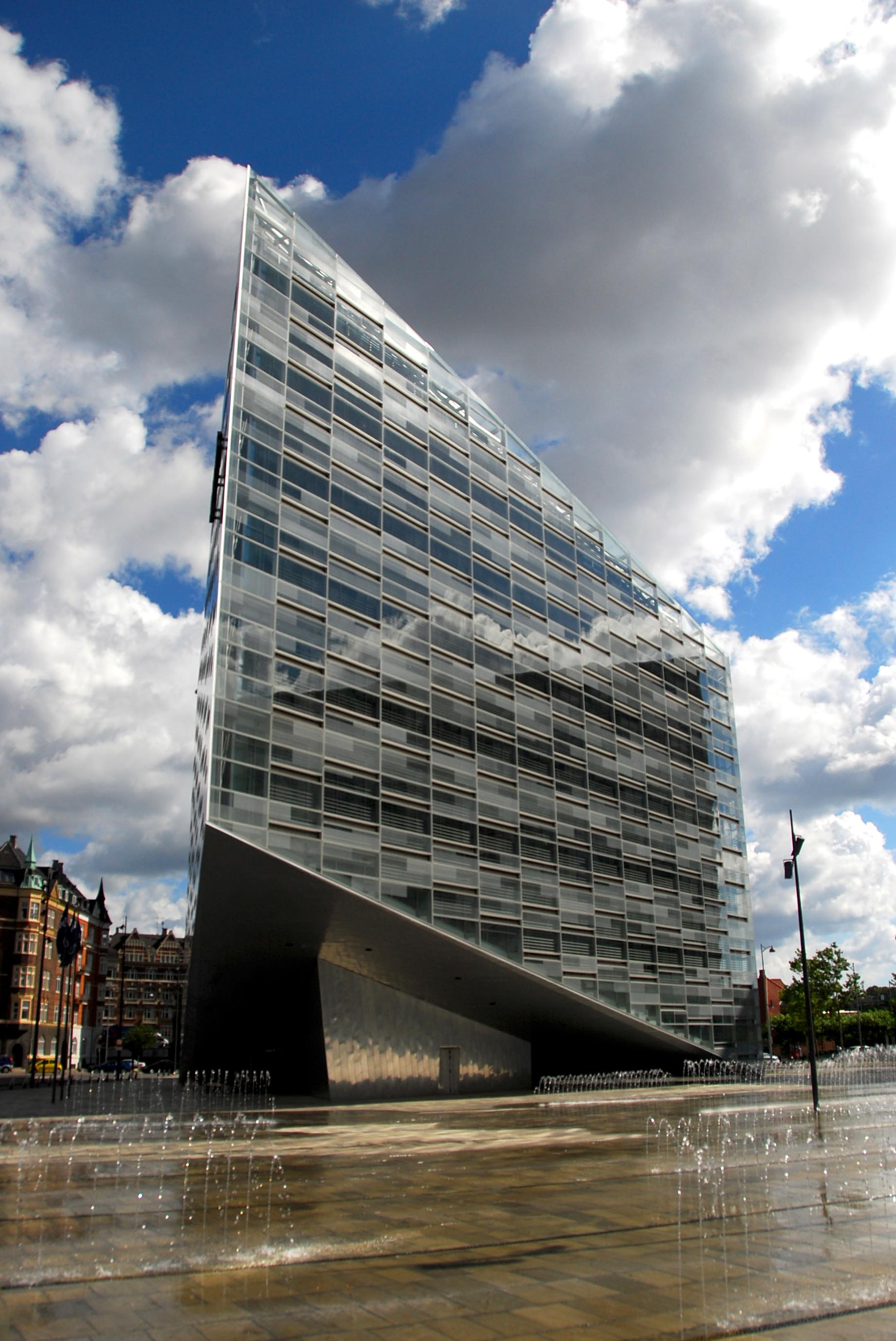 Nykredit's Krystallen Building at Kalvebod Brygge in Copenhagen, Denmark